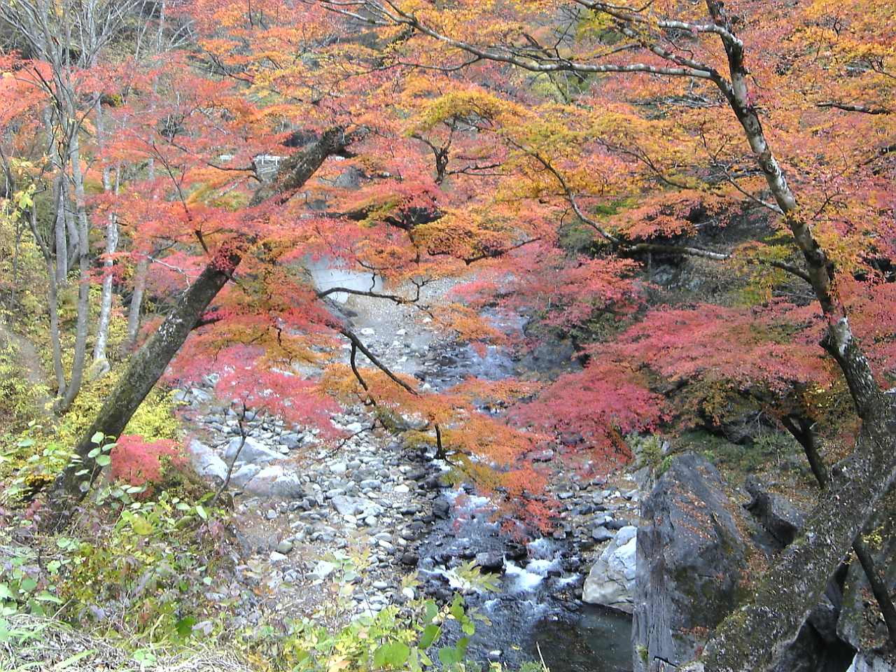 紅葉期の中津峡